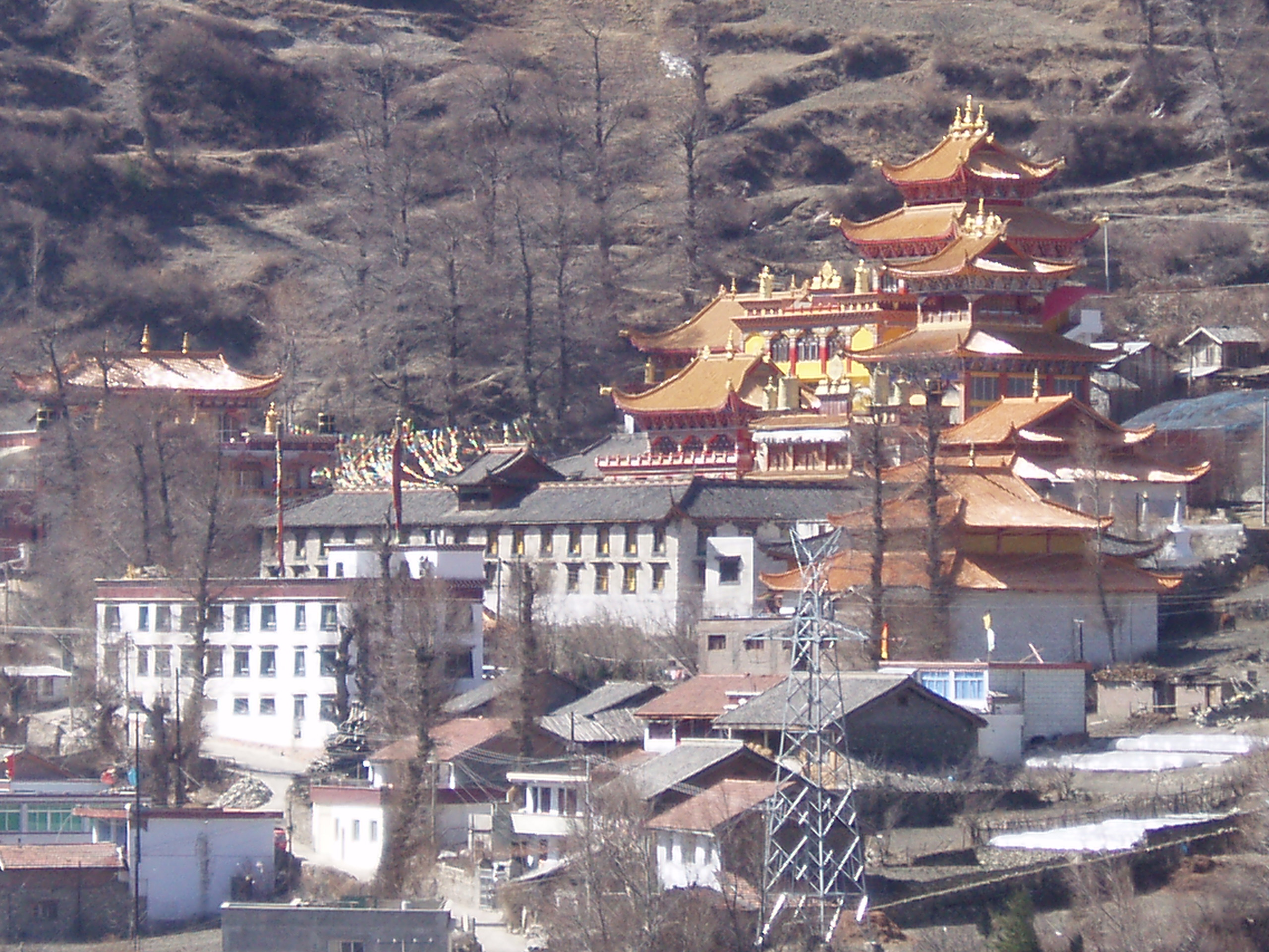 Via principale di Kangding.